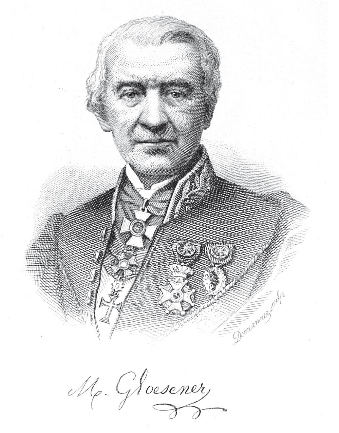 Michel Gloesener (1792-1876). Folie, François: Notice sur Michel Gloesener, membre de l’Académie. In: Annuaire de l’Académie royale des sciences, des lettres et des beaux-arts de Belgique, 44e année, 1878, p. 277-344.